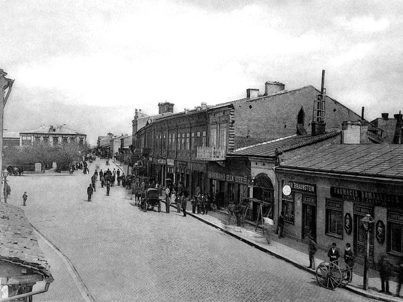 Buzău